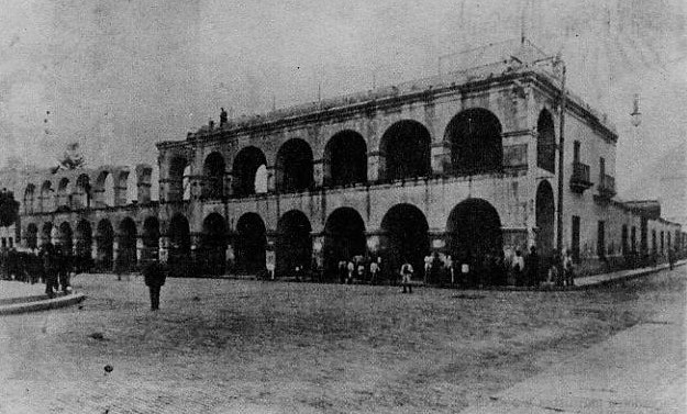 Vista de la demolición del antiguo Cabildo de San Miguel de Tucumán en 1908, para la construcción de la actual Casa de Gobierno provincial.